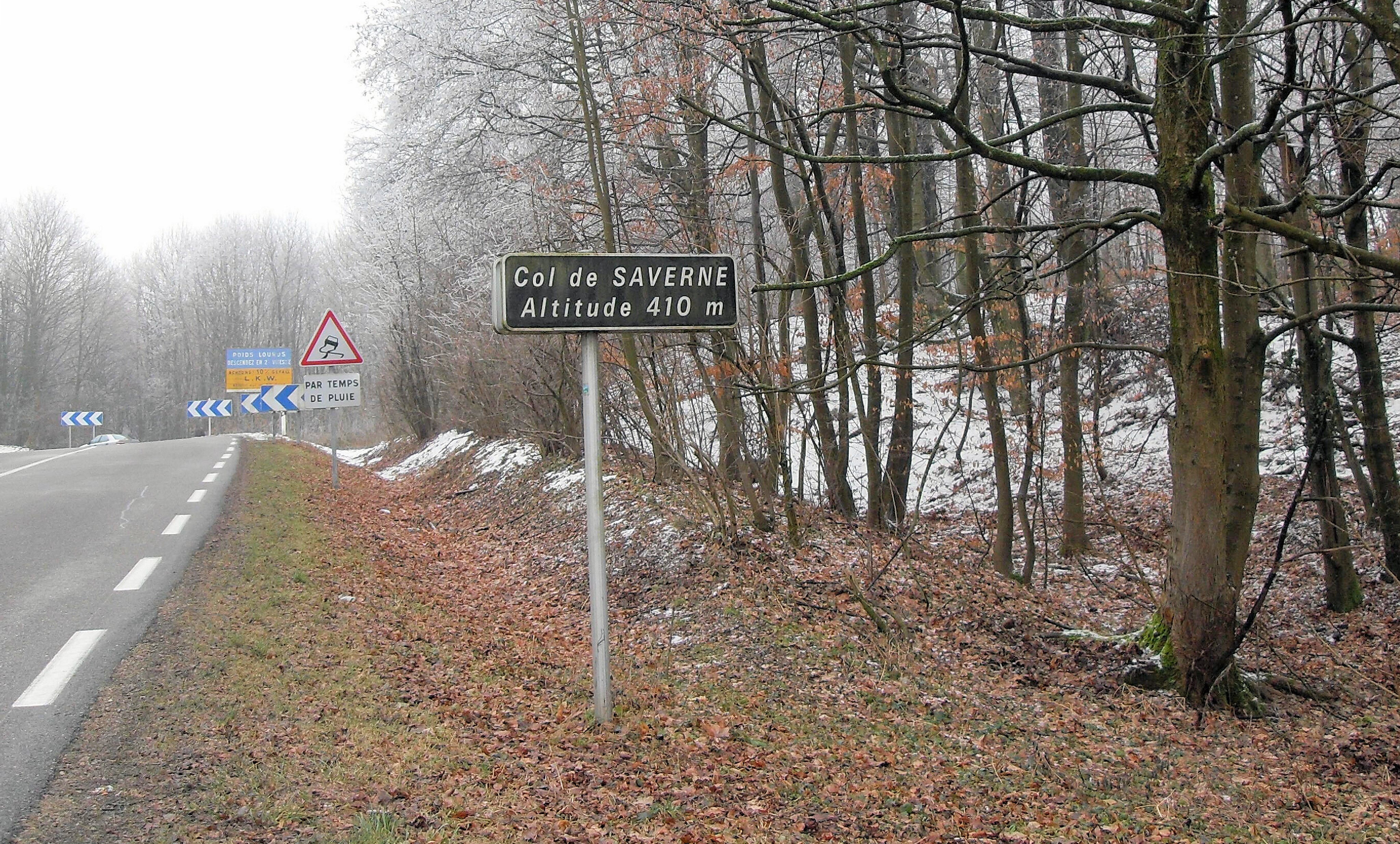 Col de Saverne en hiver